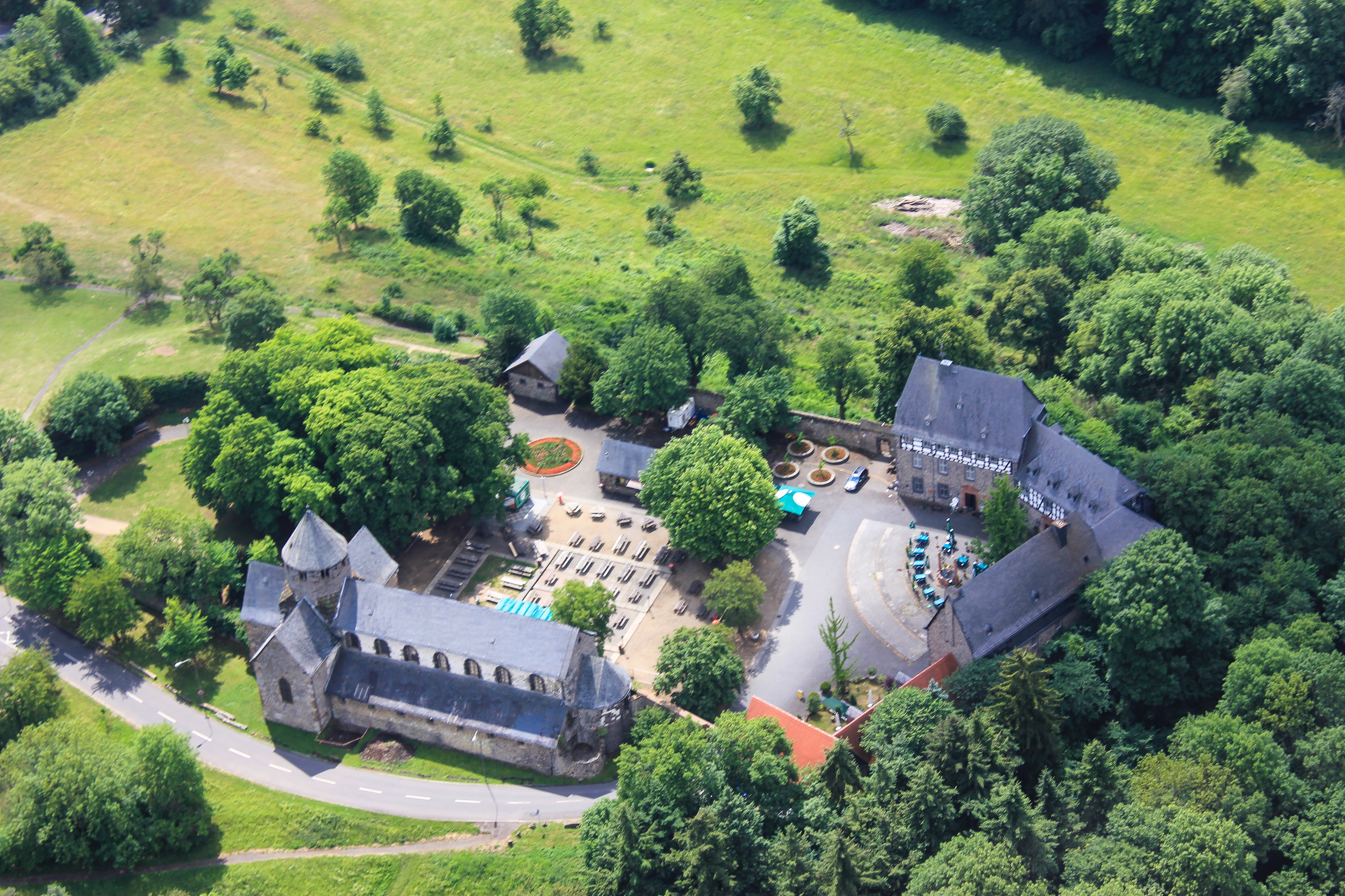 Kloster Schiffenberg, Landkreis Gießen in Hessen, Deutschland